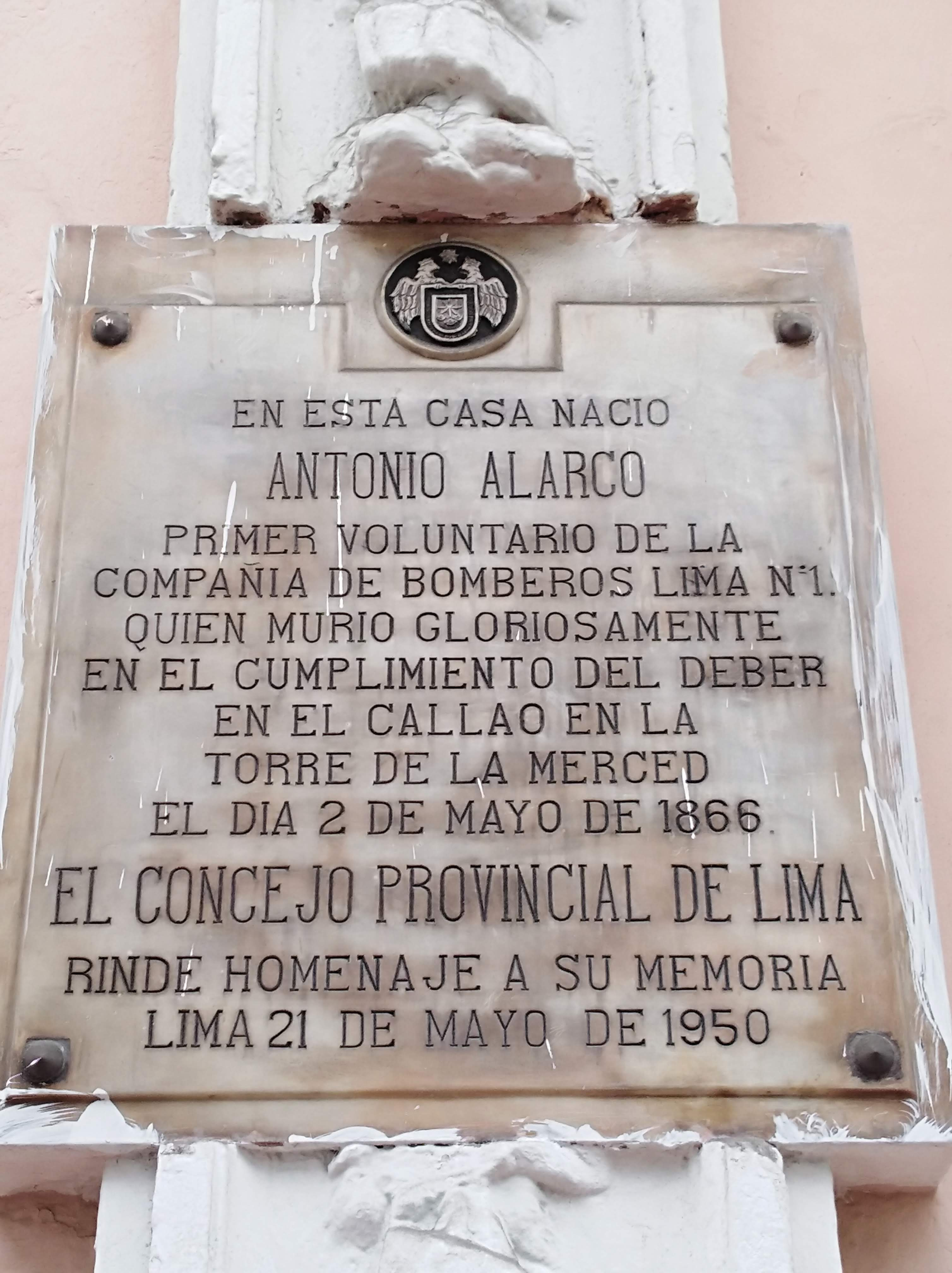 Casa donde nacieron Juana Alarco y Antonio Alarco